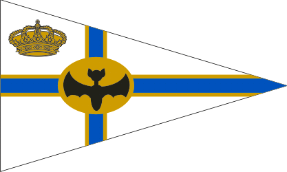 Bandera del Real Club Nautico de Valencia, Spain